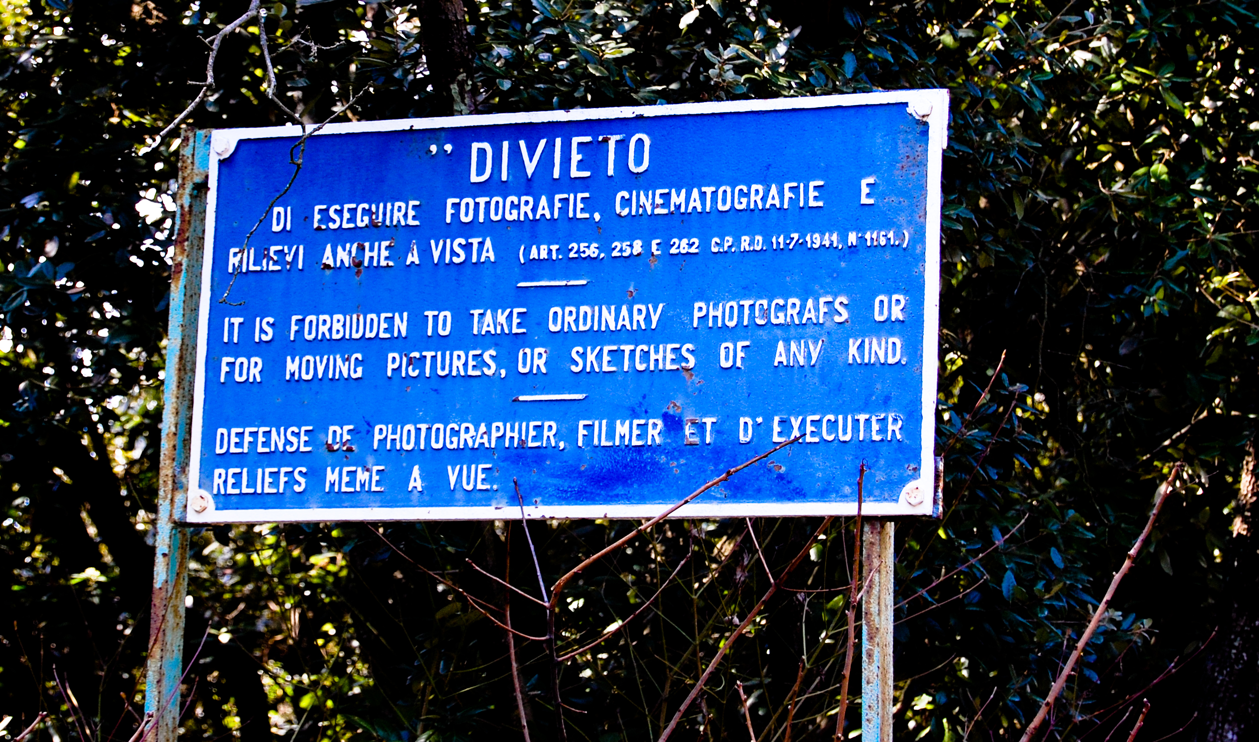 Sul Monte Conero, lungo la strada asfaltata che dal monastero conduce alla vetta.